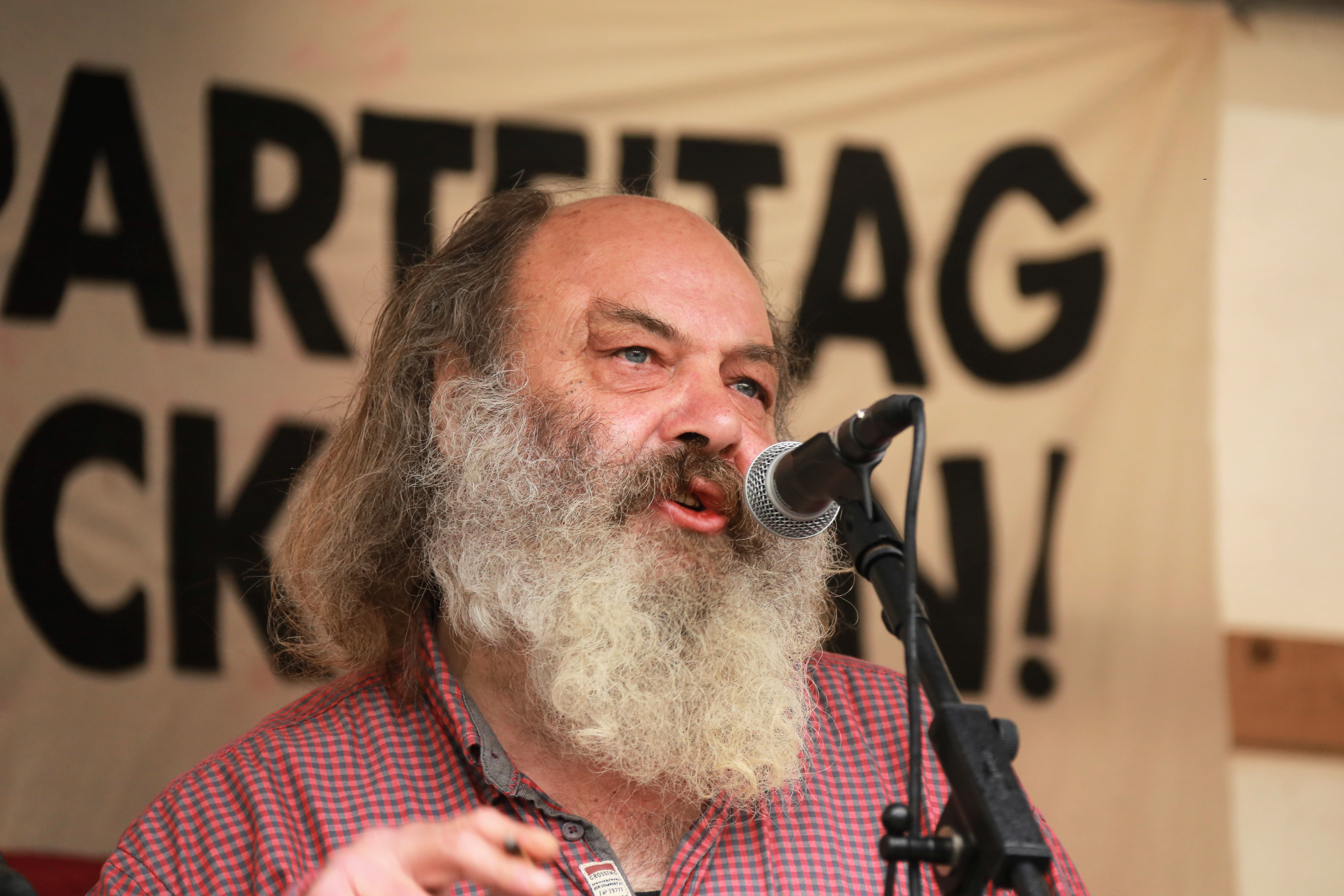 Lothar König spricht während der Demonstration von "Köln stellt sich quer" am 22. April 2017